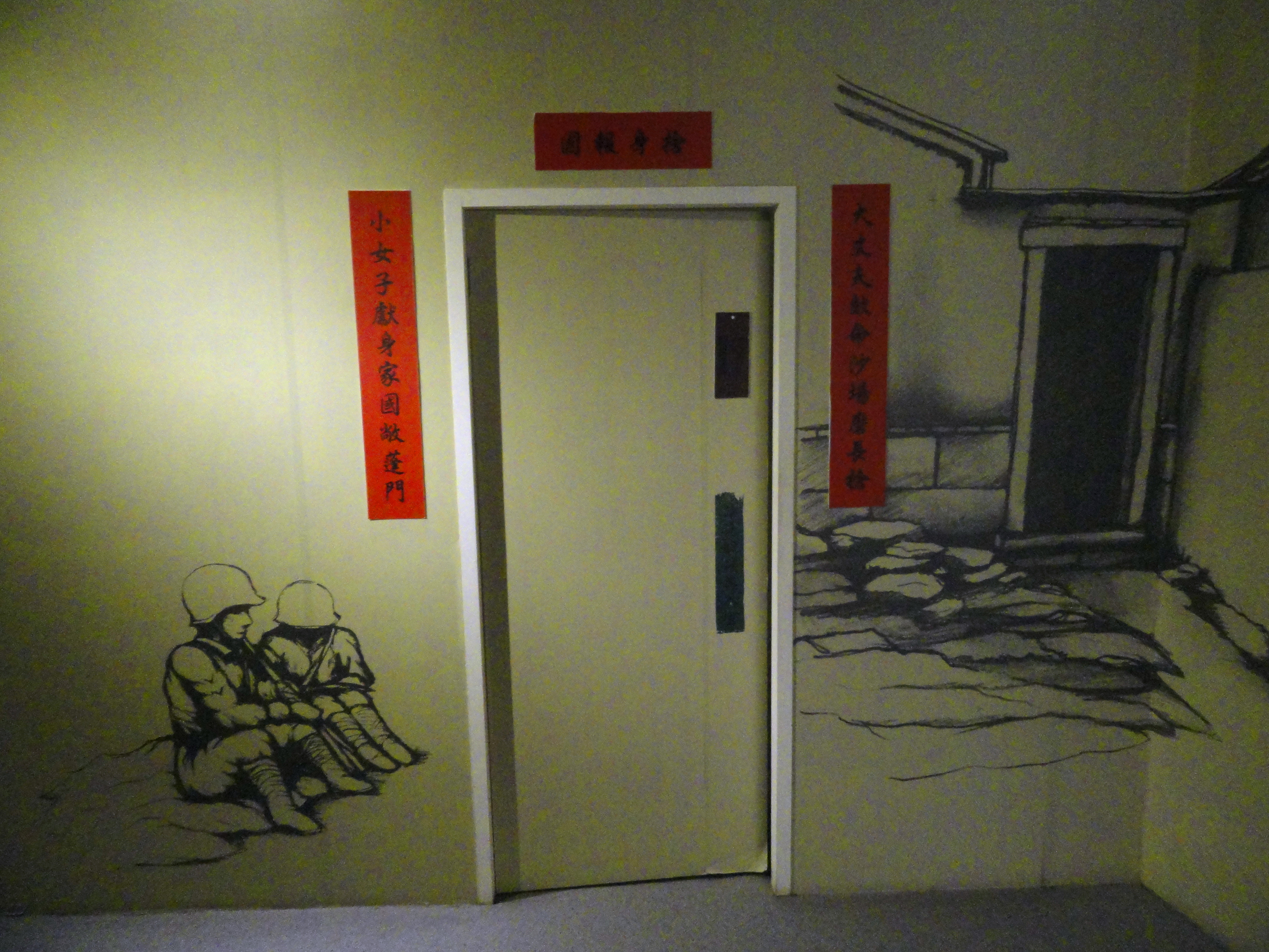 中文（台灣）: 特約茶室展區內的對聯中文（中国大陆）: 特约茶室展区内的对联